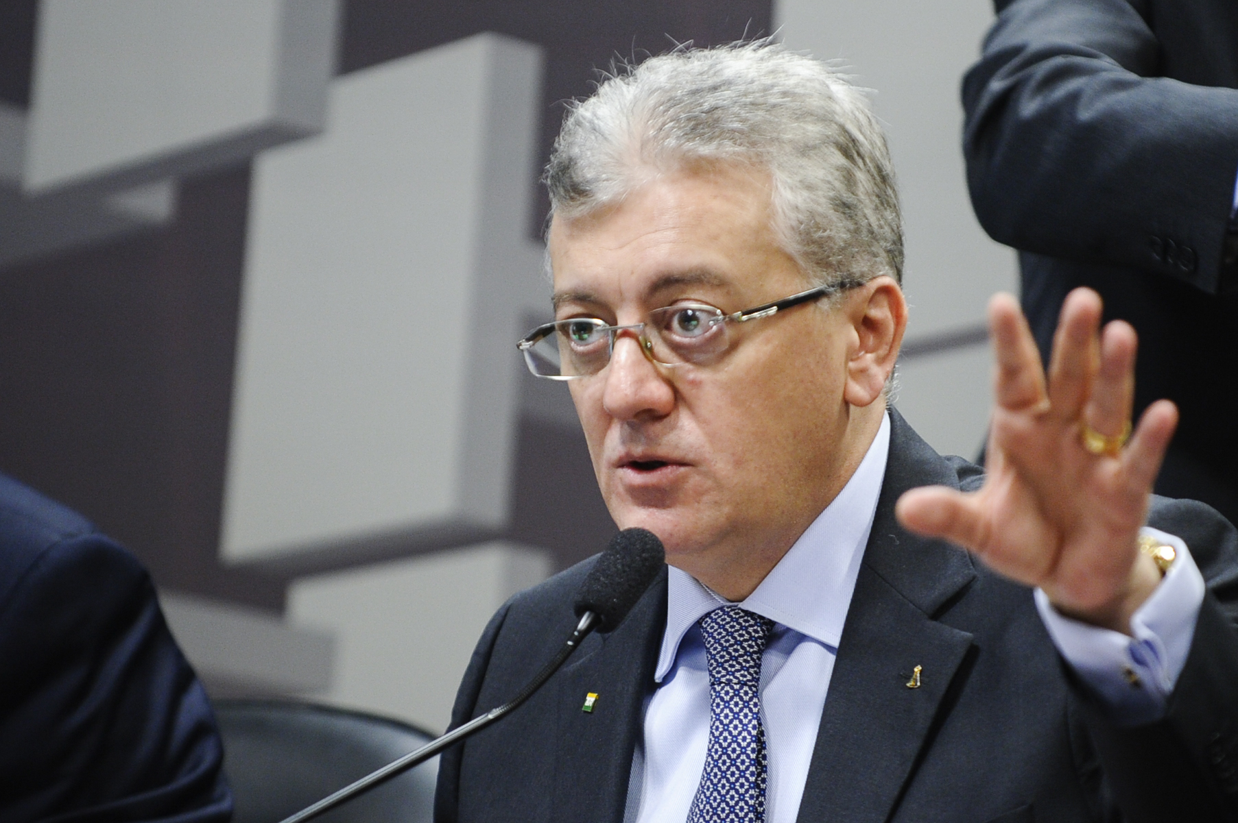 Sala de comissões do Senado Federal durante reunião conjunta das comissões de Assuntos Econômicos (CAE) e de Serviços de Infraestrutura (CI). Audiência pública conjunta sobre a situação financeira da Petrobras, com a participação do presidente da estatal, Aldemir Bendine, e do diretor financeiro, Ivan de Souza Monteiro. Em pronunciamento, presidente da Petrobras, Aldemir Bendine; Foto: Marcos Oliveira/Agência Senado